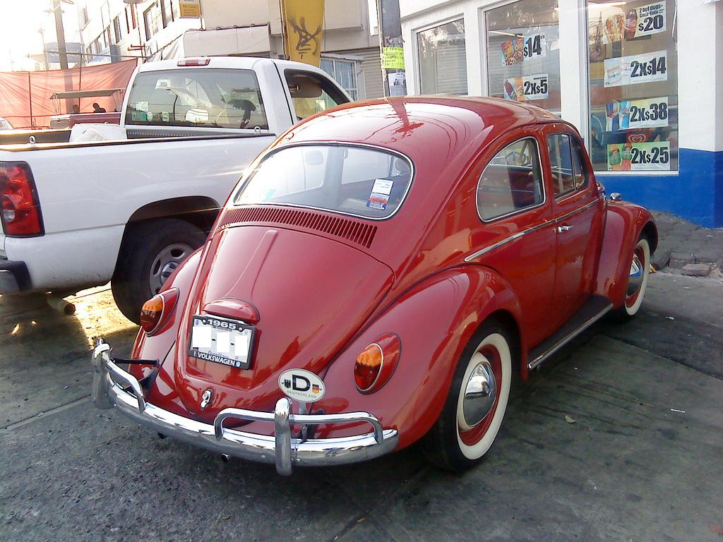 A 1965 mexican Volkswagen Beetle